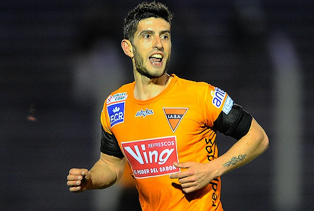 Futbolista uruguayo del equipo de fútbol uruguayo Institución Atlética Sudamérica